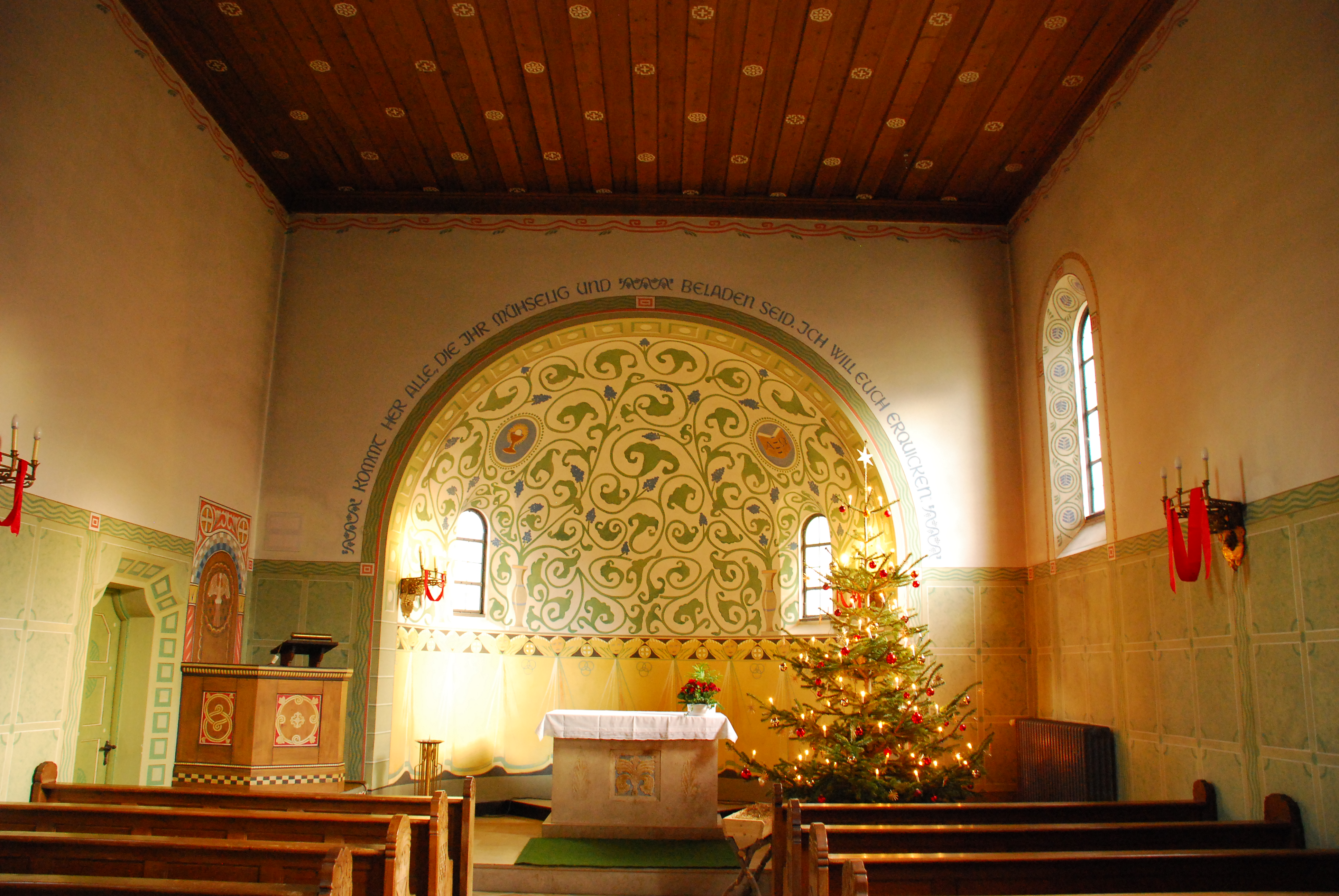 Innenraum der evangelischen Jesuskirche auf dem Gelände des Isar-Amper-Klinikums München-Ost in Haar, Landkreis München, Regierungsbezirk Oberbayern, Bayern. Als Baudenkmal unter Aktennummer D-1-84-123-9 in der Bayerischen Denkmalliste aufgeführt. Erbaut im Jahr 1905, Innenraum 1958 verändert und zwischen 1995 und 2008 zur Ursprungsgestaltung zurückgeführt.